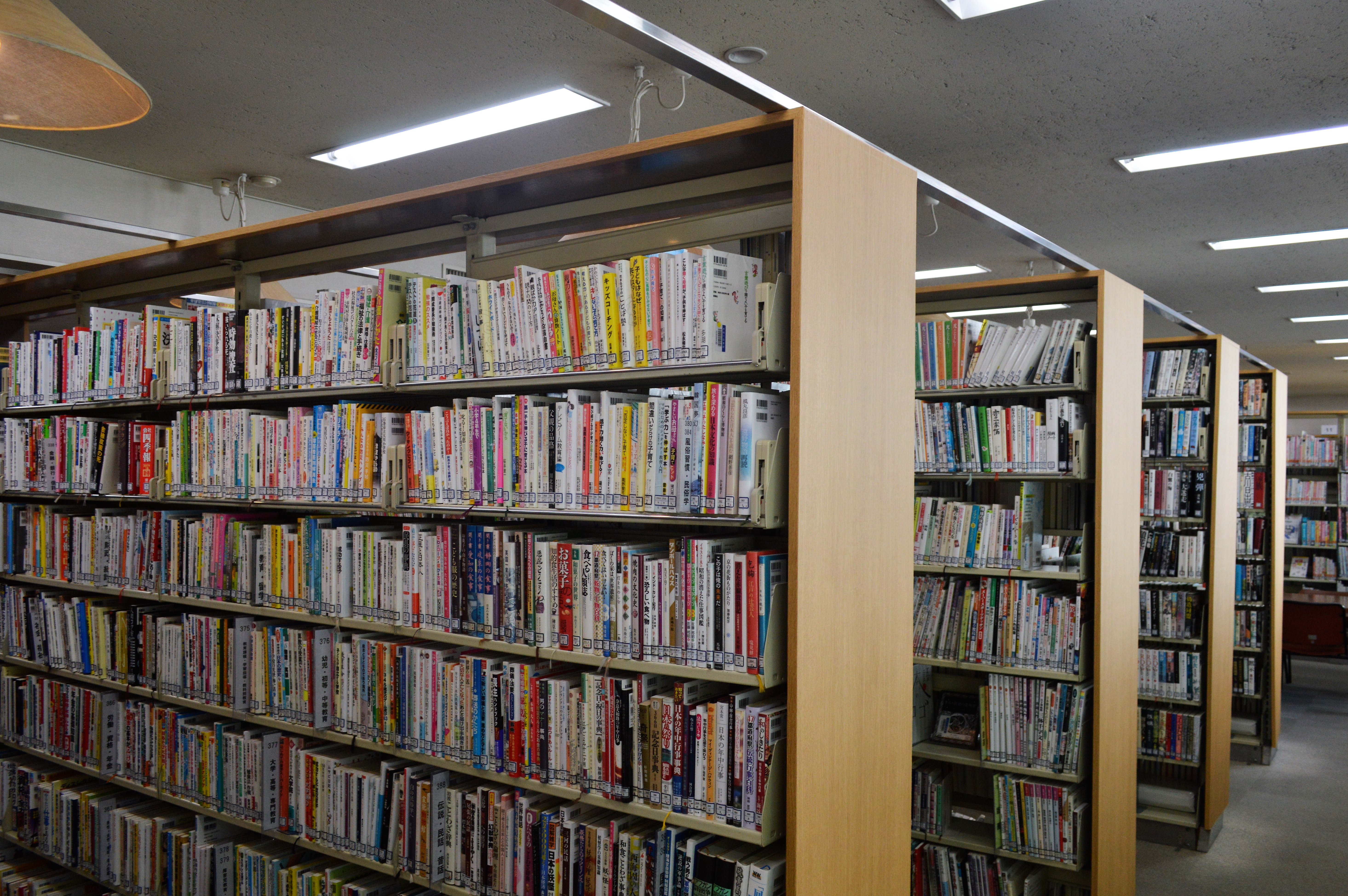 豊橋市民文化会館の1階にある豊橋市向山図書館。